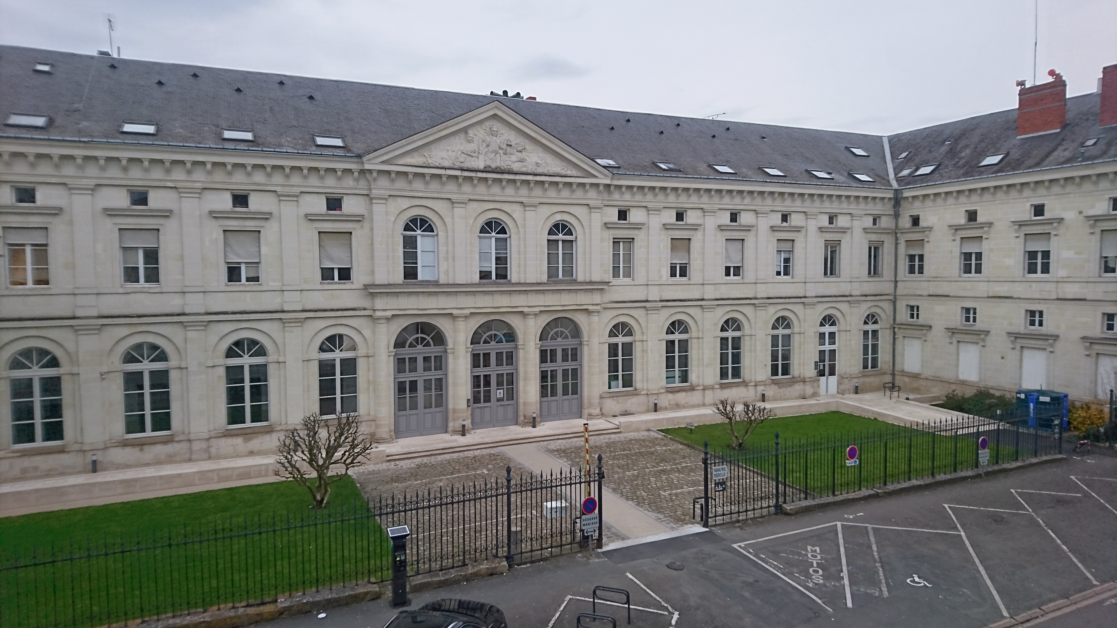 Mairie Châtellerault